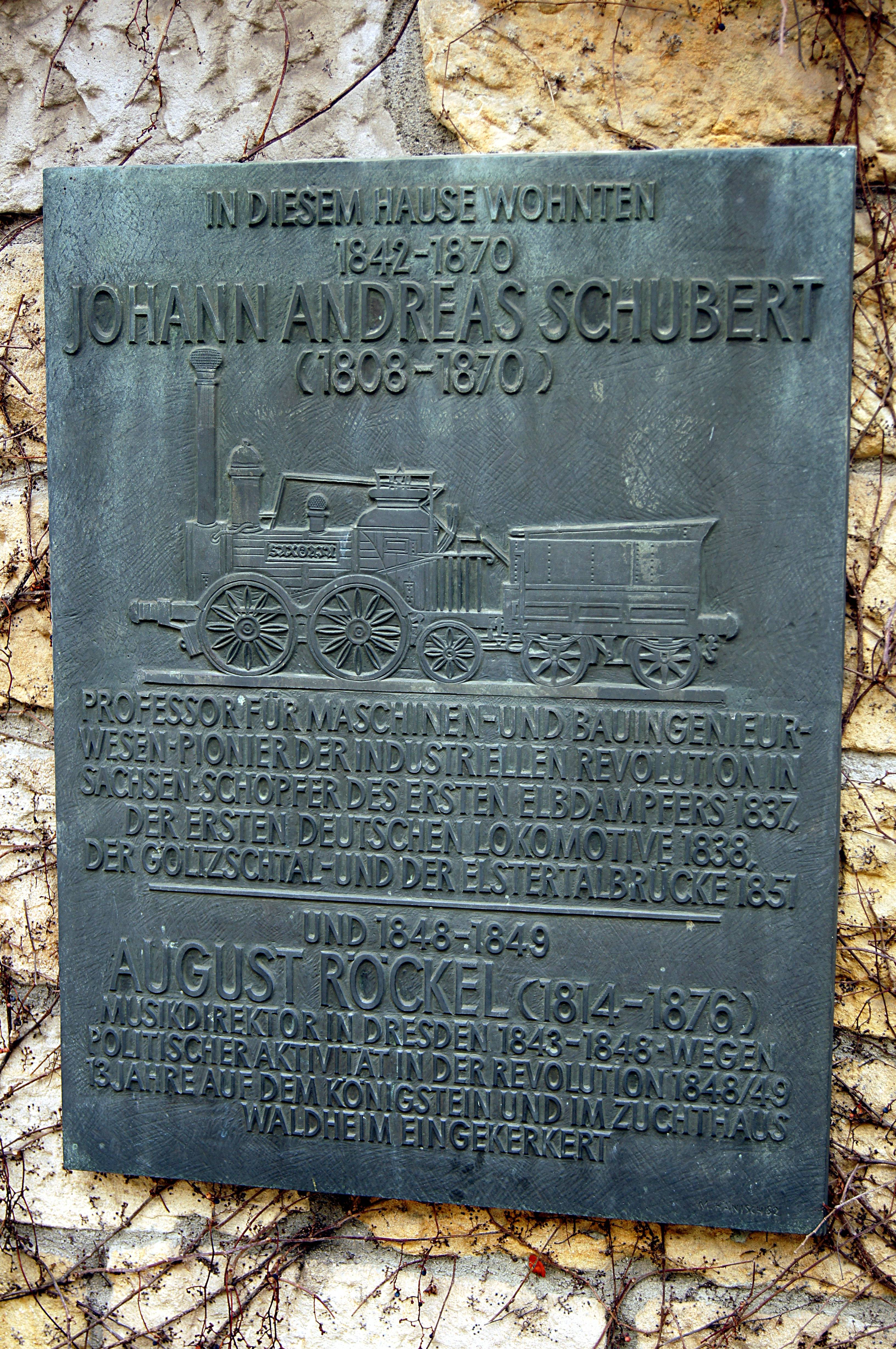 Gedenktafel an Johann Andreas Schubert und August Röckel an der Friedrichstraße